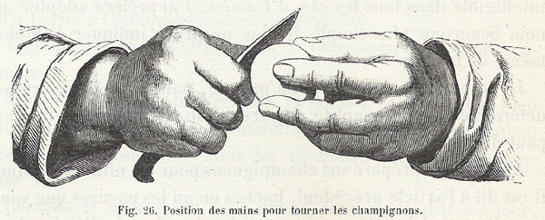 Dessin issu du « Livre de cuisine » de Jules Gouffé (1867), indiquant comment placer les mains pour tourner les champignons